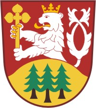 Kocbeře znak